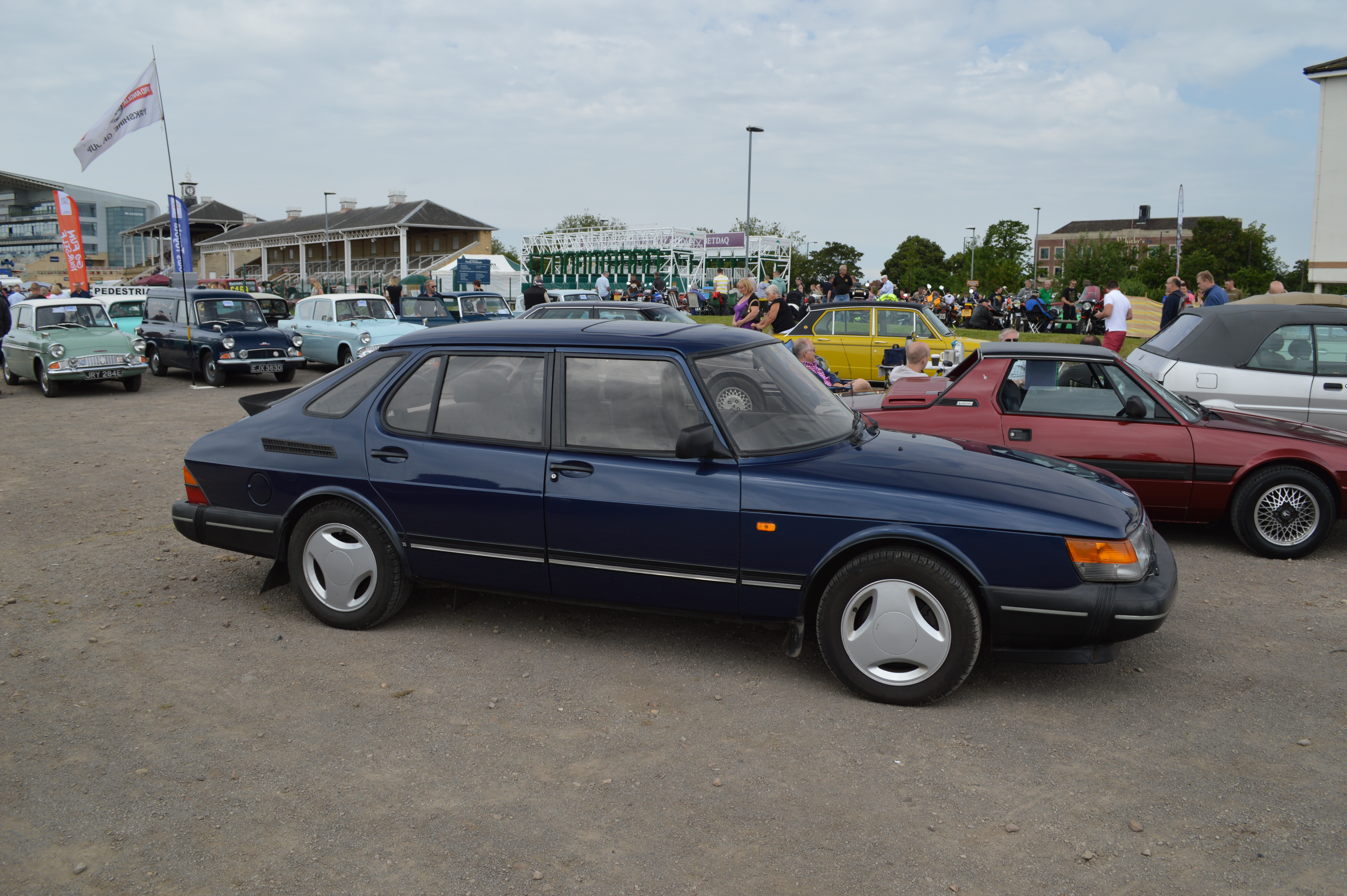 Saab 900